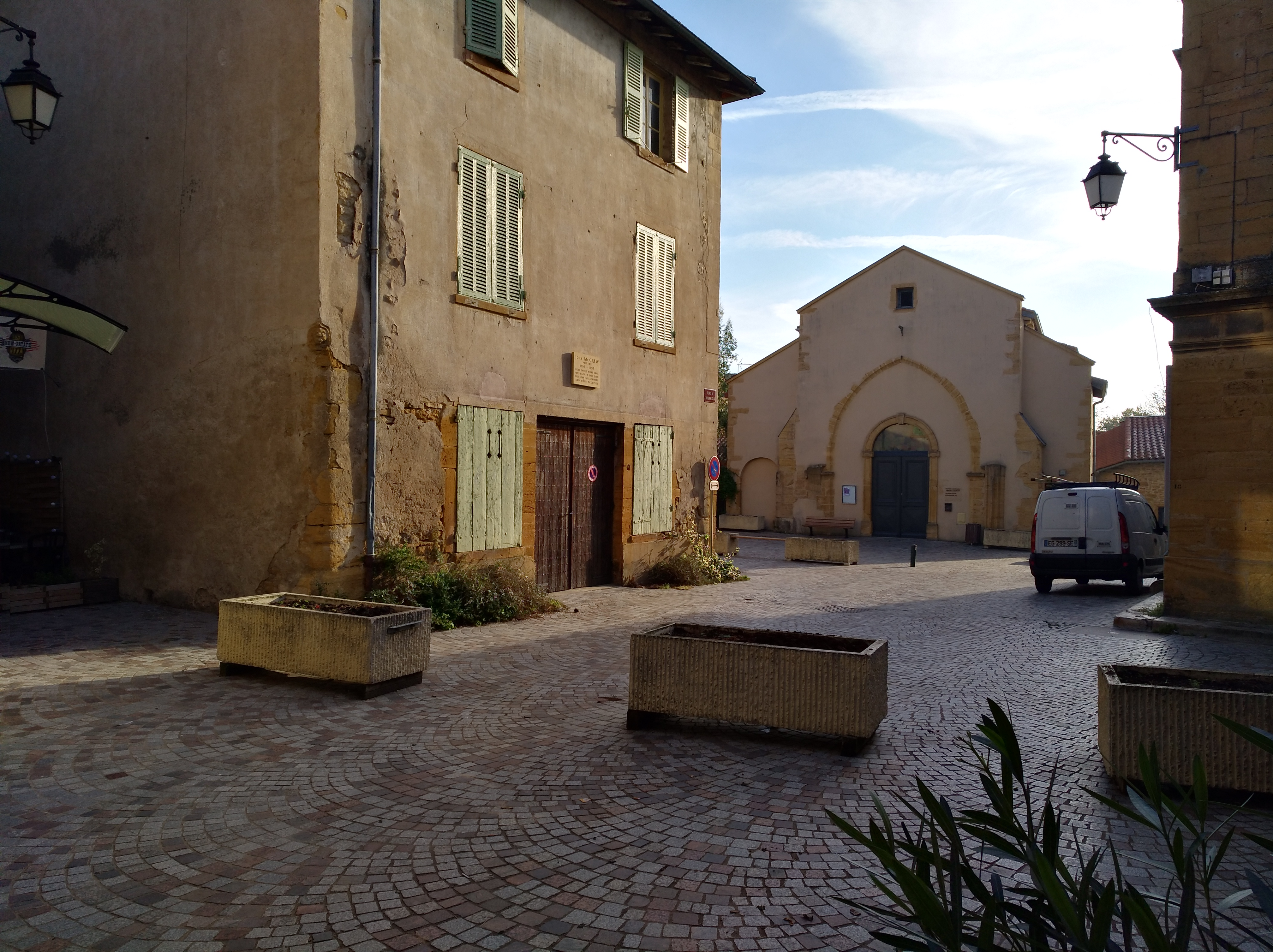 Place de l'Ancienne Église au Bois-d'Oingt (commune du Val-d'Oingt, Rhône, France).